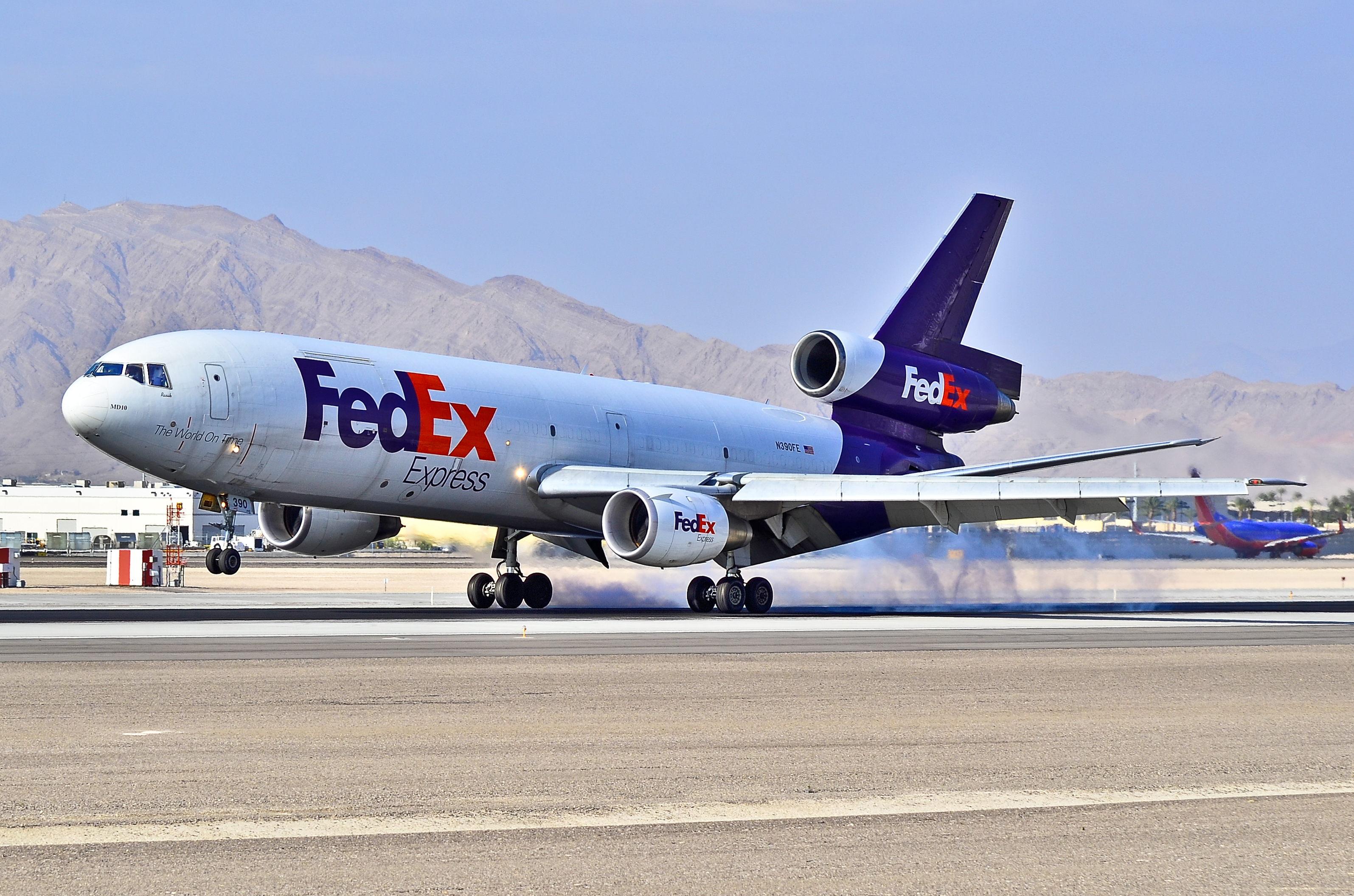 Las Vegas - McCarran International (LAS / KLAS) USA - Nevada, May 25, 2012 Photo: Tomás Del Coro